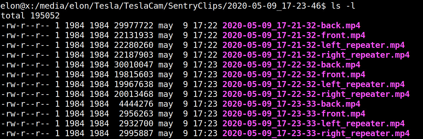 Si el pendrive o disco duro usado para el modo Centinela se formatea en EXT4, las carpetas y grabaciones tendrán como propietario y grupo el 1984.